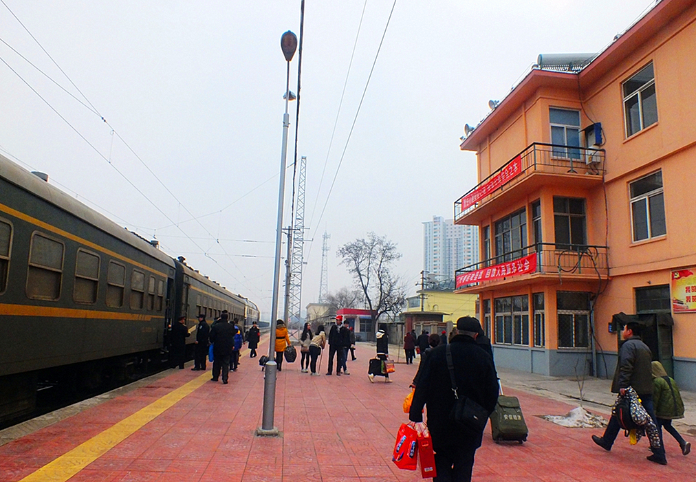 莱芜东站站房和7053/7054次“庄户列车”绿皮火车